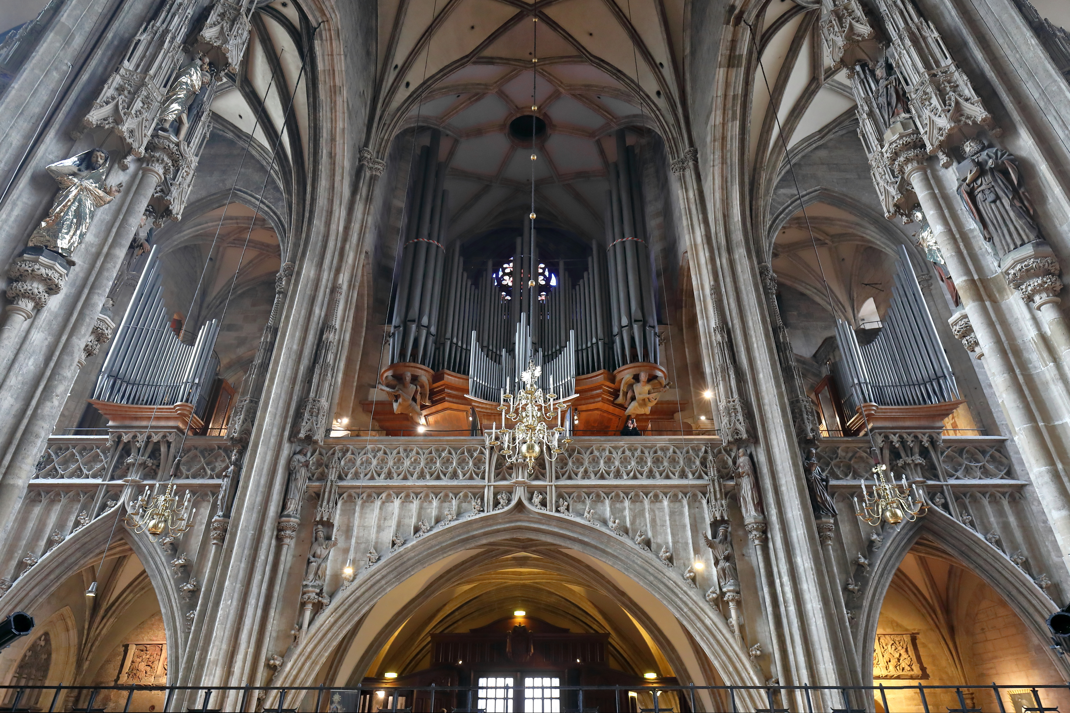 Die Kauffmann-Orgel auf der Westempore des Stephansdoms in der österreichischen Bundeshauptstadt Wien.Die Orgel mit 3 Brüstungspositive wurde von 1956 bis 1960 von Johann M. Kauffmann errichtet und am 2. Oktober 1960 geweiht. Mit 125 Register auf vier Manualen und Pedal sowie mit insgesamt rund 10.000 Pfeifen ist sie die größte Orgel, die jemals in Österreich errichtet wurde, und bis heute das größte Musikinstrument der Republik. Nachdem die neue Domorgel (Rieger-Orgel) mit 55 Register auf 4 Manualen im Chor des südlichen Seitenschiffes (nahe der Vierung) 1991 in Betrieb genommen wurde, erfolgte die Stilllegung der Kauffmann-Orgel.